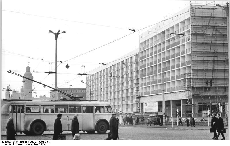 Leipzig, Nürnberger Ecke Windmühlenstraße, Wohnblock Zentralbild Koch 2.12.1965 Auch in der Messestadt Leipzig macht der Wohnungsbau gute Fortschritte. So entstehen in der Windmühlenstraße Ecke Nürnberger Straße 412 Wohnungen, eine Gaststätte und eine Apotheke. [Bildmitte: Oberleitungsbus]